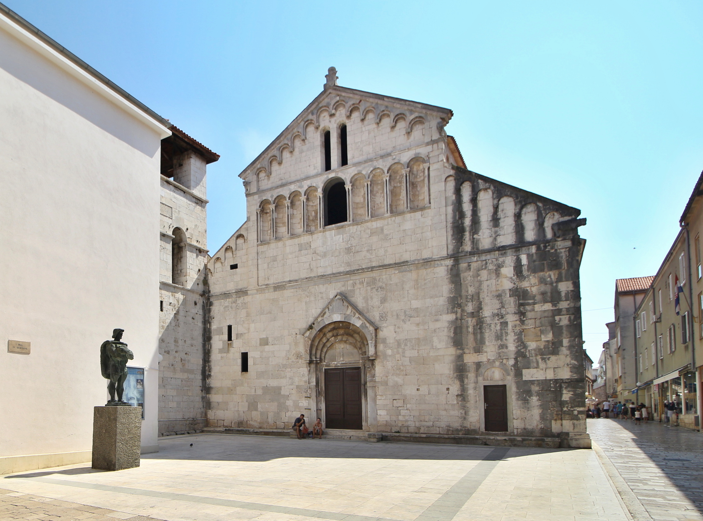 Kostel sv. Chrysogona (Krševana) v Zadaru